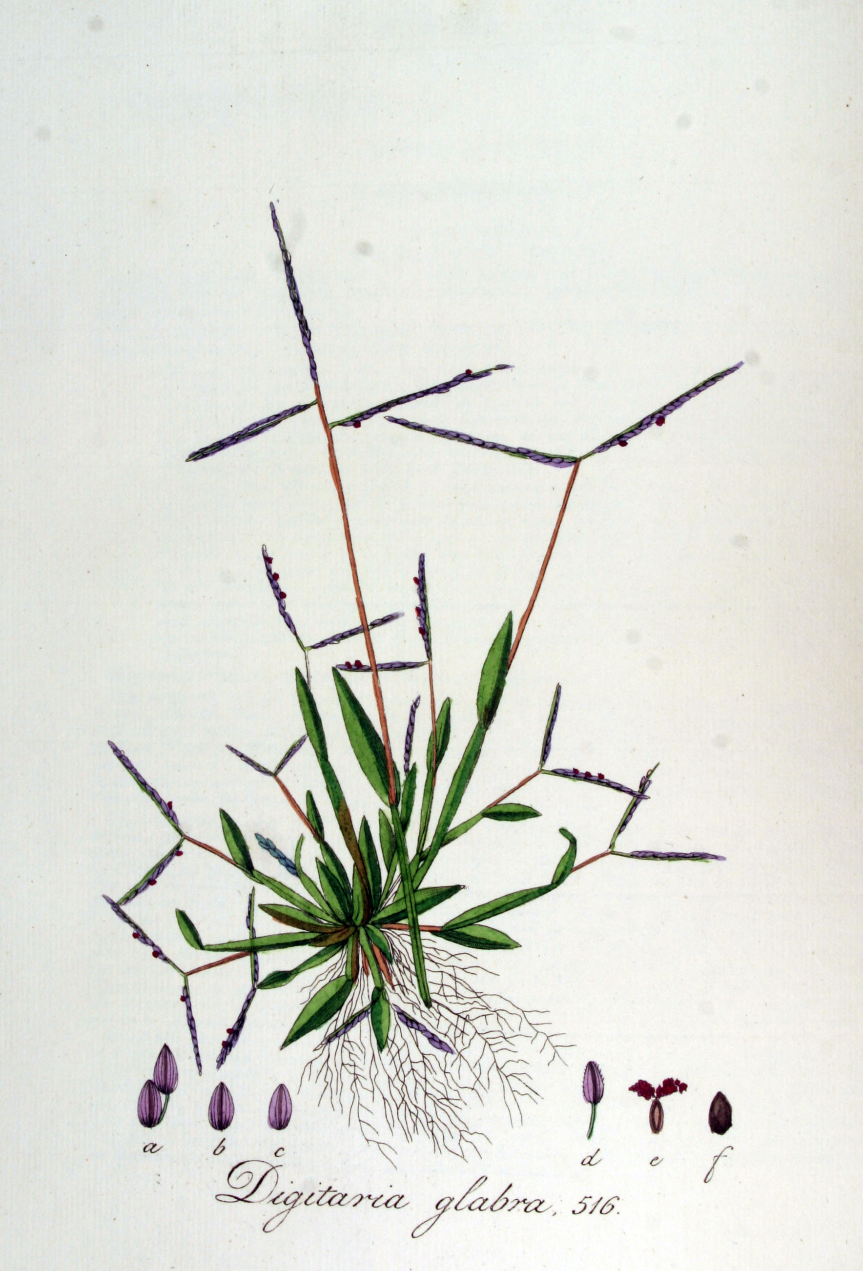 Digitaria ischaemum (Schreb. ex Schweigg.) Muhlenb. (Syn. Digitaria glabra (Schrad.) P. Beauv.)